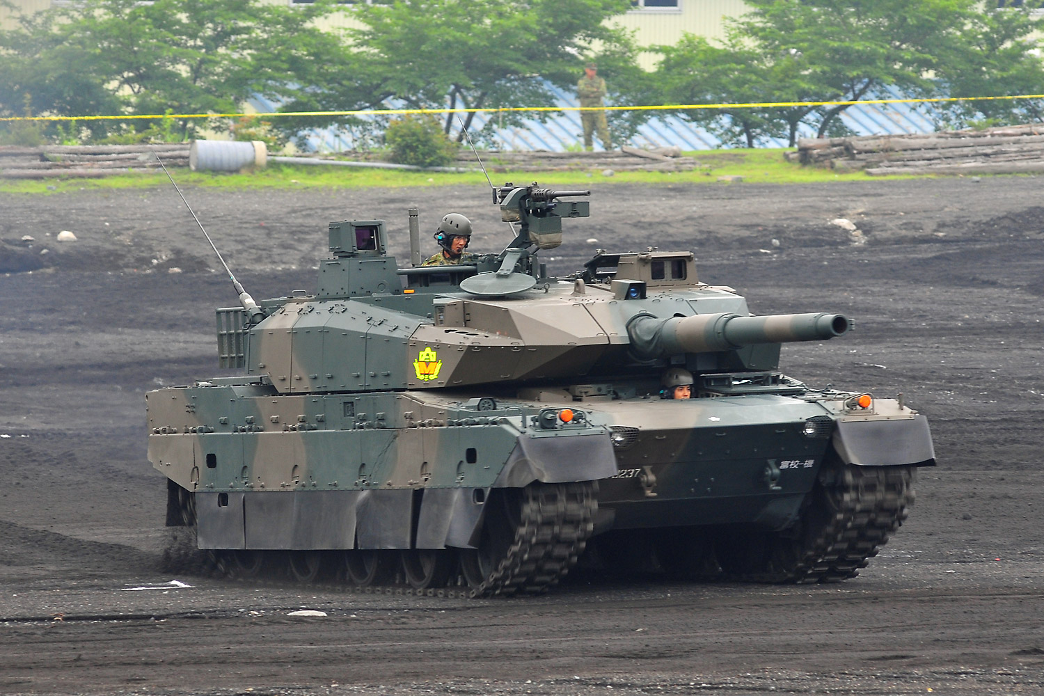 El tipo 10 tanque de batalla principal.